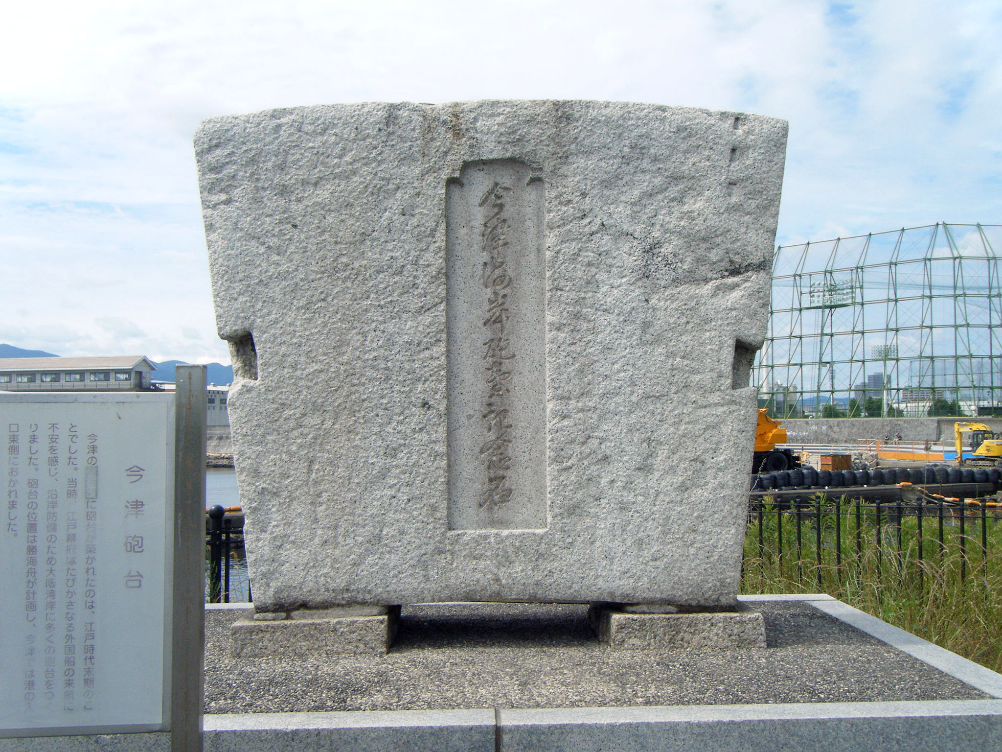 今津砲台跡（今津海岸砲台記念石） 正面 兵庫県西宮市